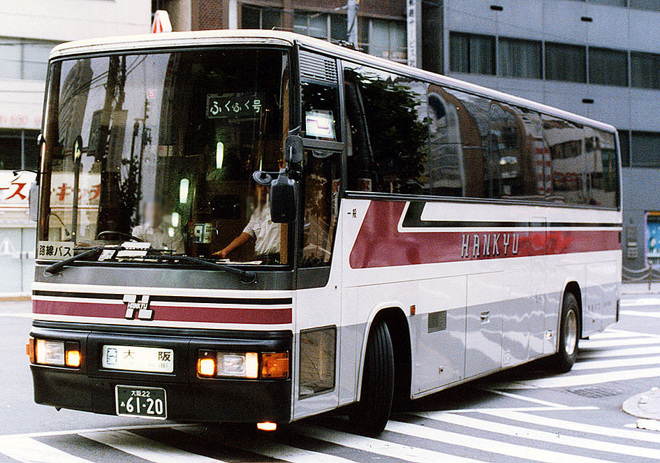 阪急バス ふくふく号（大阪） 三菱ふそう P-MS729S 西工SD-II